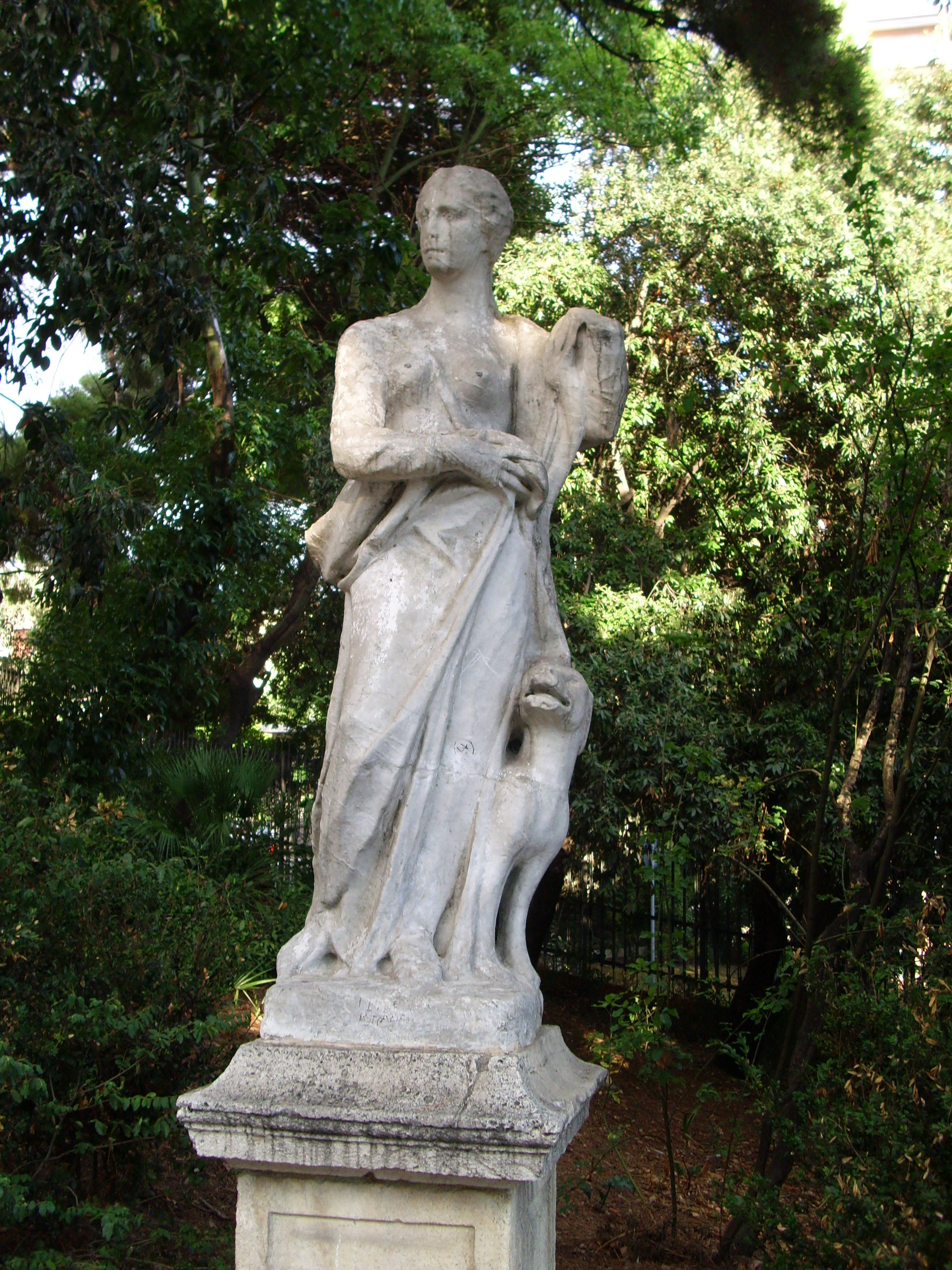 Il parco di Villa Imperiale Scassi, Genova Sampierdarena